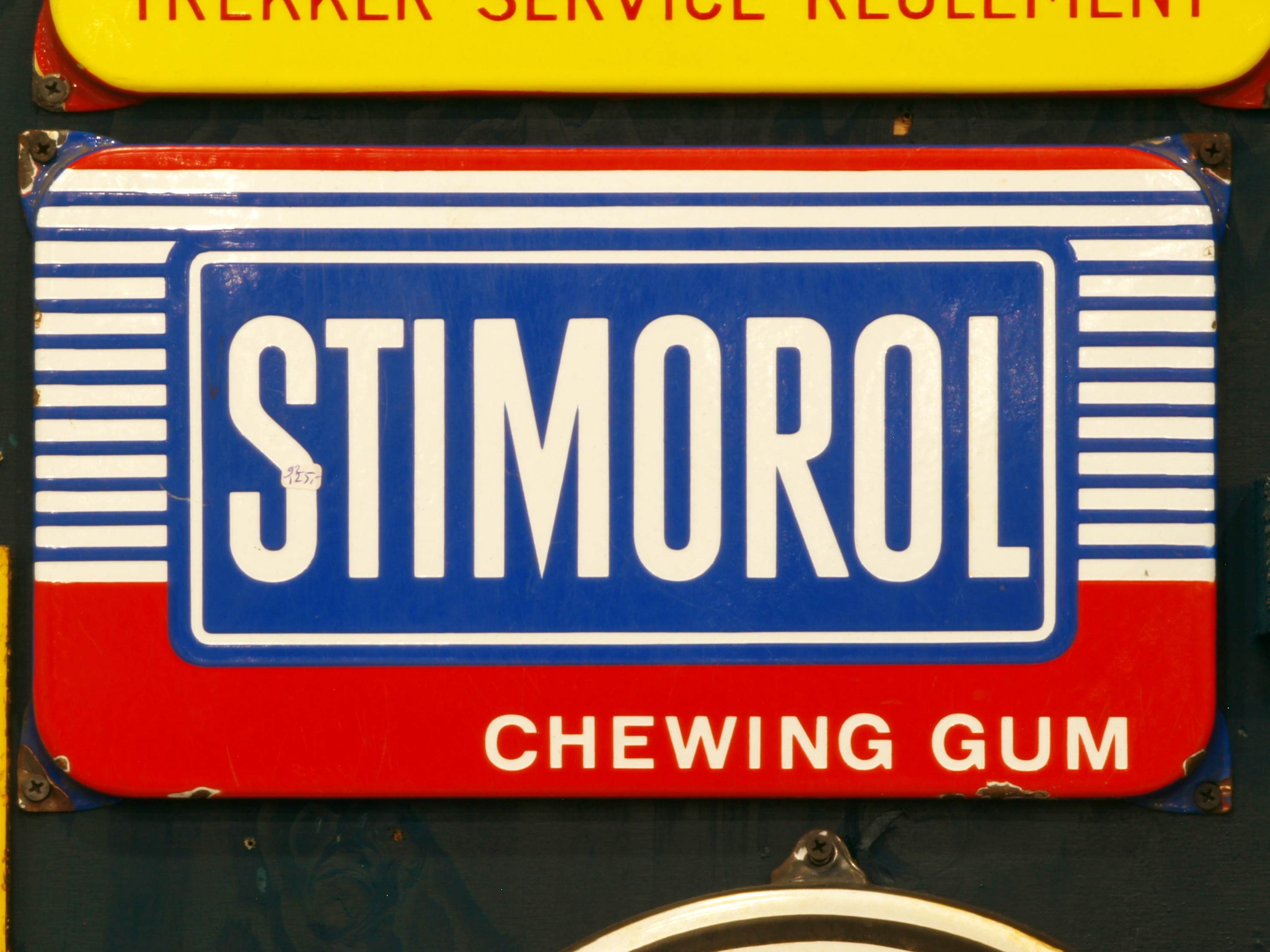 Enamel advertising sign.